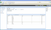 Talend MDM